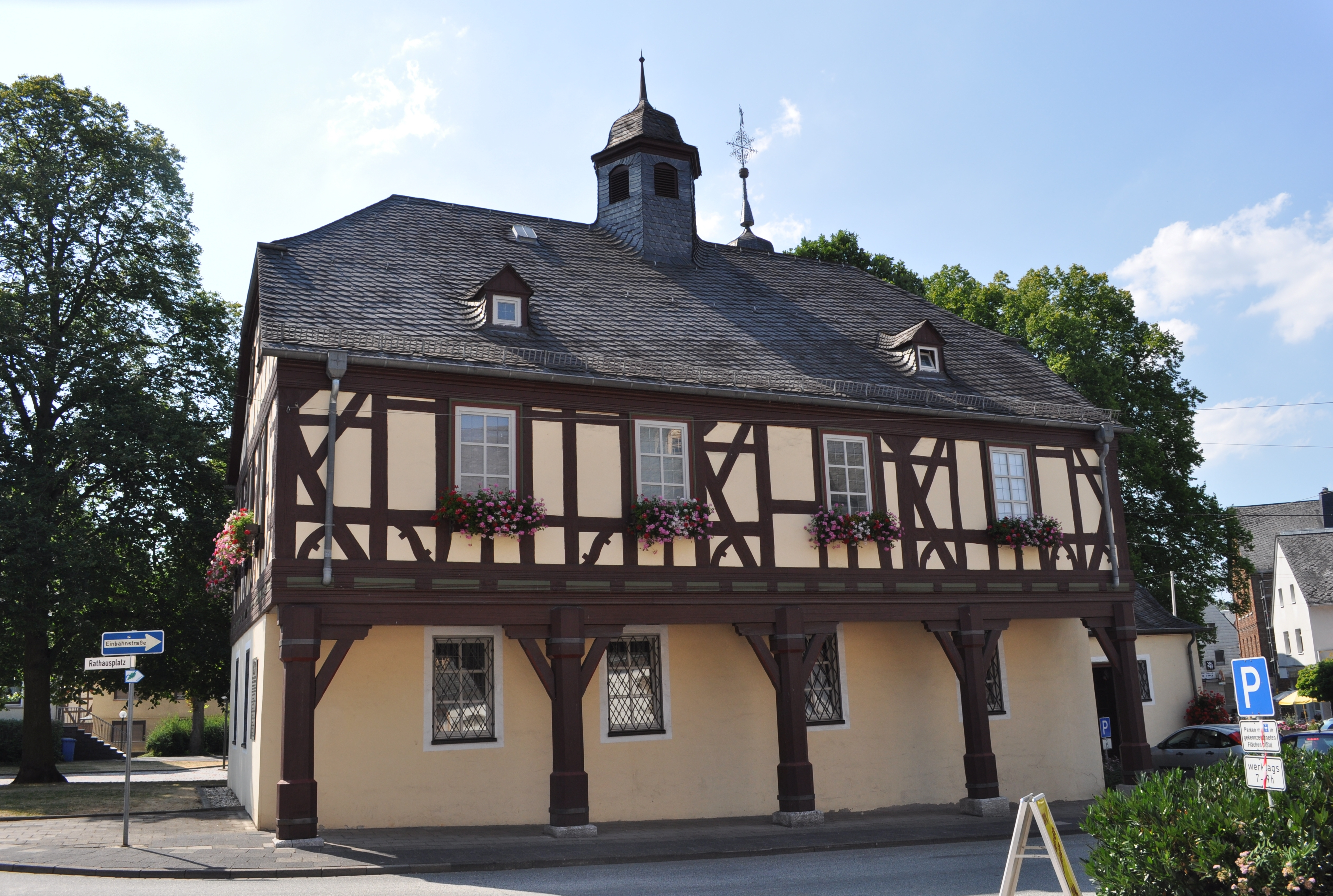 Amtshaus in Weilmünster. Das Gebäude wurde im 17. Jahrhundert erreichtet und war Sitz des Oberschulheißen und des Gerichtes. 1772 bis 1822 diente das Gebäude auch als Schule. Eine Jungen- und eine Mädchenklasse waren eingerichtet. 1822 bis 1915 war das Haus Schulgebäude von Weilmünster. 1915 bis 1965 wurde das Haus als Wohnhaus genutzt.1969 bis 1974 wurden vorbereitende Arbeiten zur Nutzungsänderung durchgeführt und 1979/80 die Sanierung abgeschlossen. Heute ist das Haus Sitz des Bauamtes und des Standesamtes.